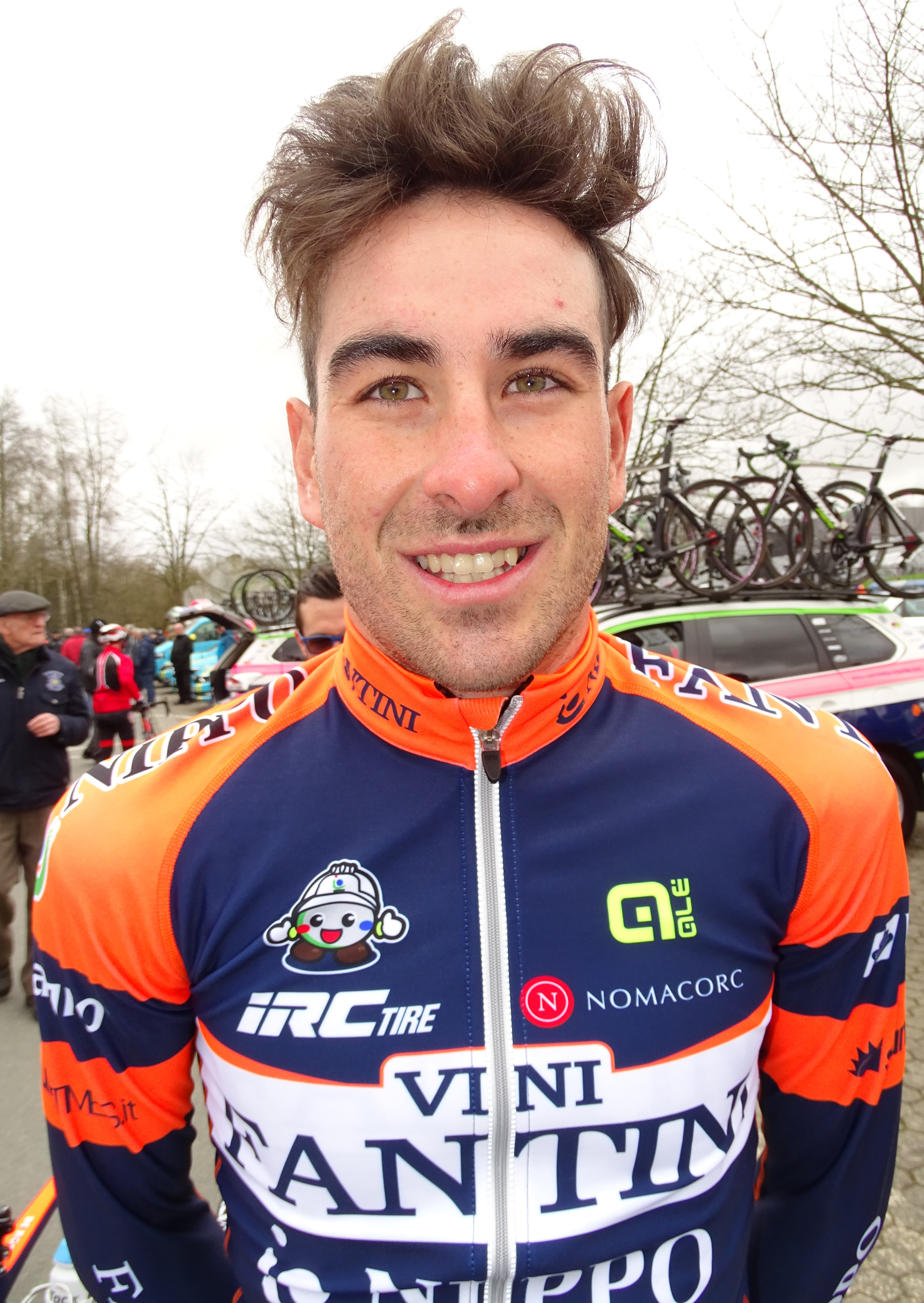 Reportage réalisé le mercredi 1er avril à l'occasion du départ de la deuxième étape des Trois jours de La Panne 2015 à Zottegem, Belgique.